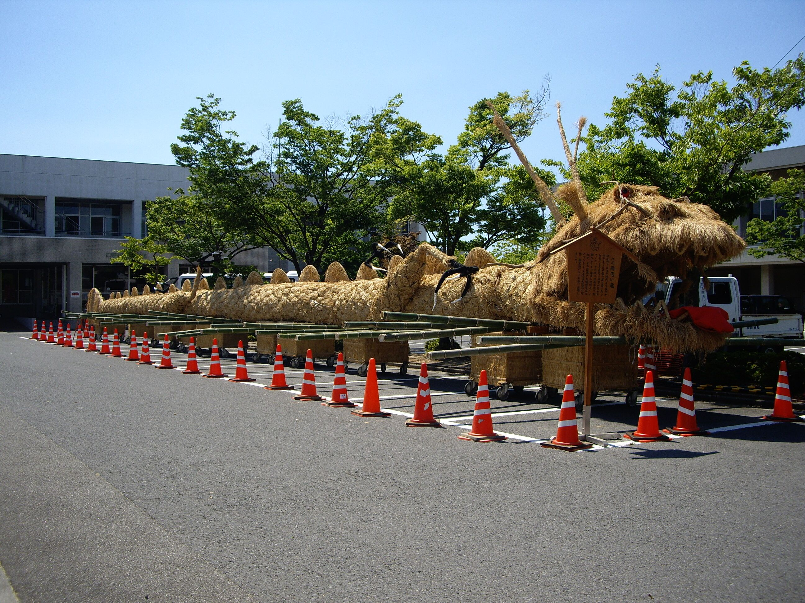 仁尾 雨乞い竜 : 「仁尾竜まつり」にて、雨乞い神事に用いられる出し物 - 香川県三豊市仁尾支所にて撮影。